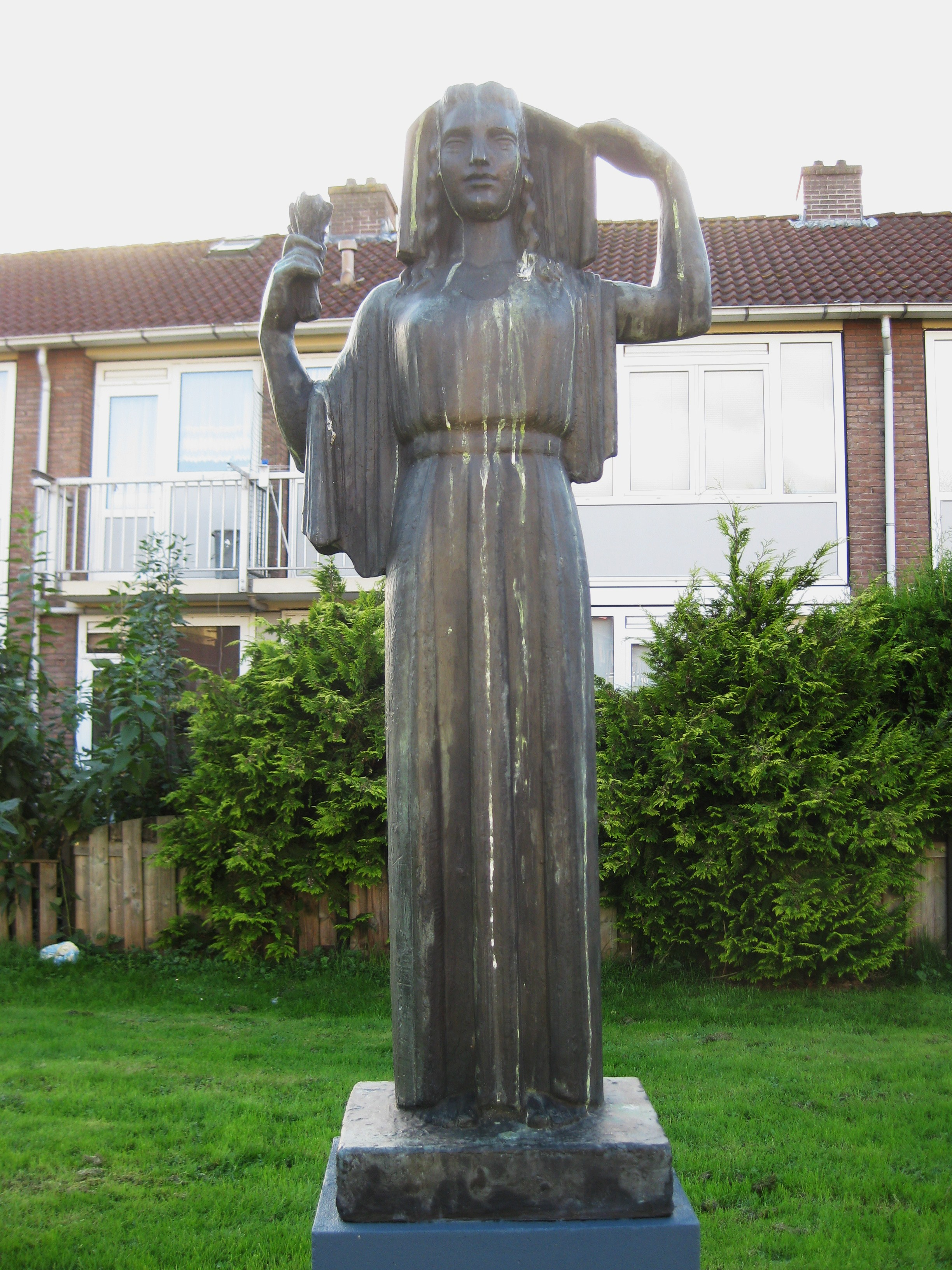 O, Kora, dochter van Zeus, 1967. Beeldhouwer Johan Limpers. Winnende inzending Prix de Rome 1940. Amsterdam-West. (Geuzenveld/Slotermeer)